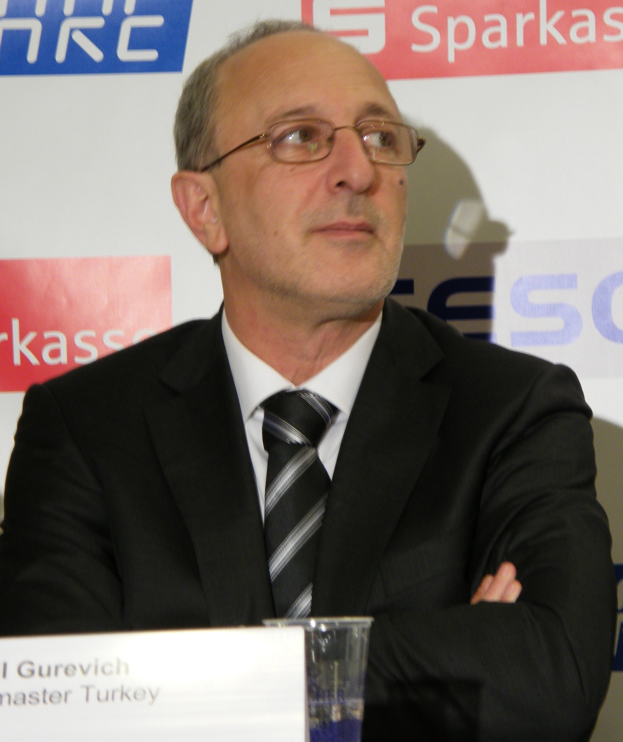 Michail Gurewitsch bei einer Pressekonferenz der 38. Schacholympiade in Dresden 2008